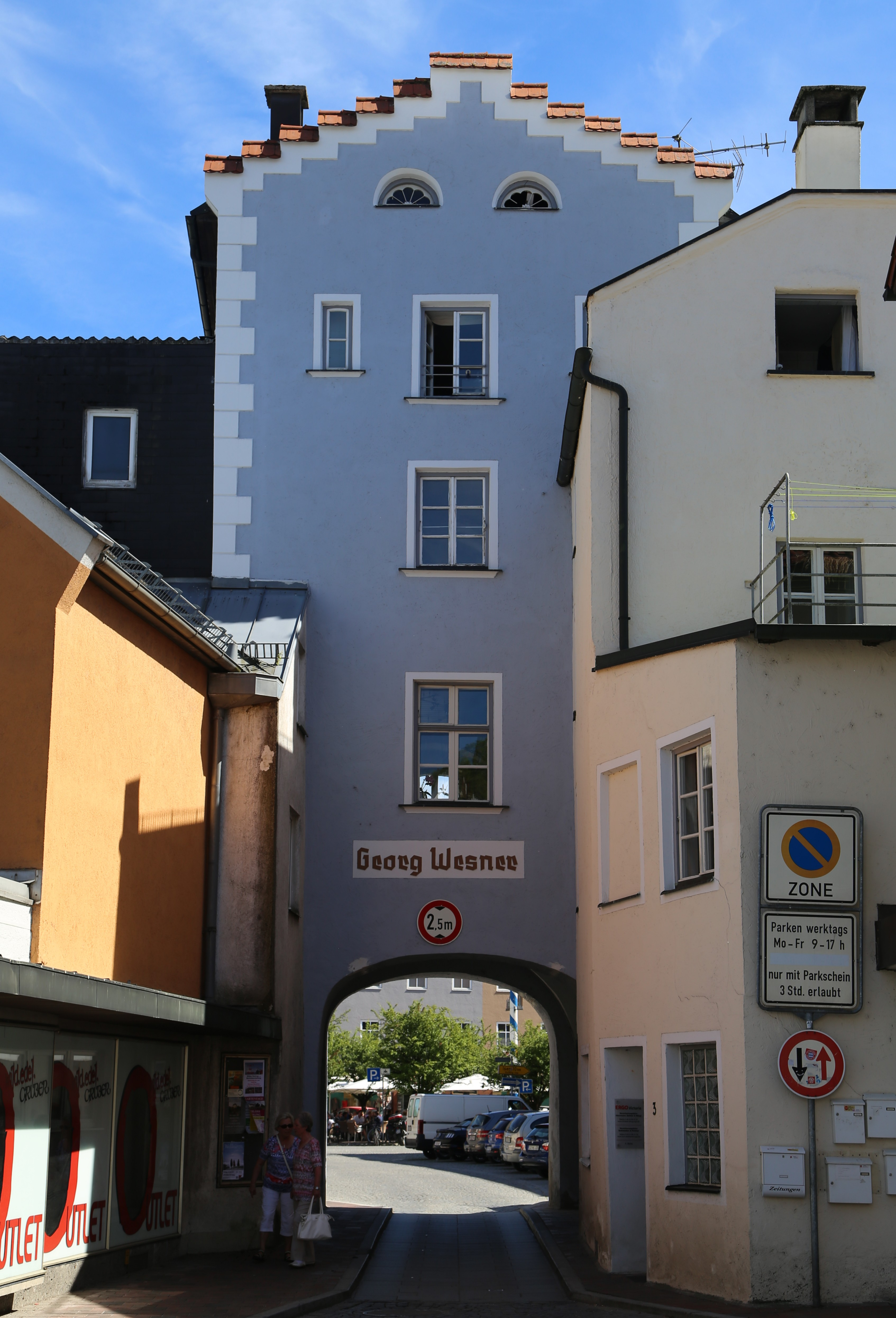 Kirchtorplatz 3, Dorfen; Nördliches Stadttor, sogenanntes Kirchtor oder Münchner Tor, viergeschossiger Turm mit Staffelgiebel, im Kern 16. Jahrhundert, gotisierend überarbeitet und Wohnhaus mit Flachdach angefügt Ende 19. Jahrhundert